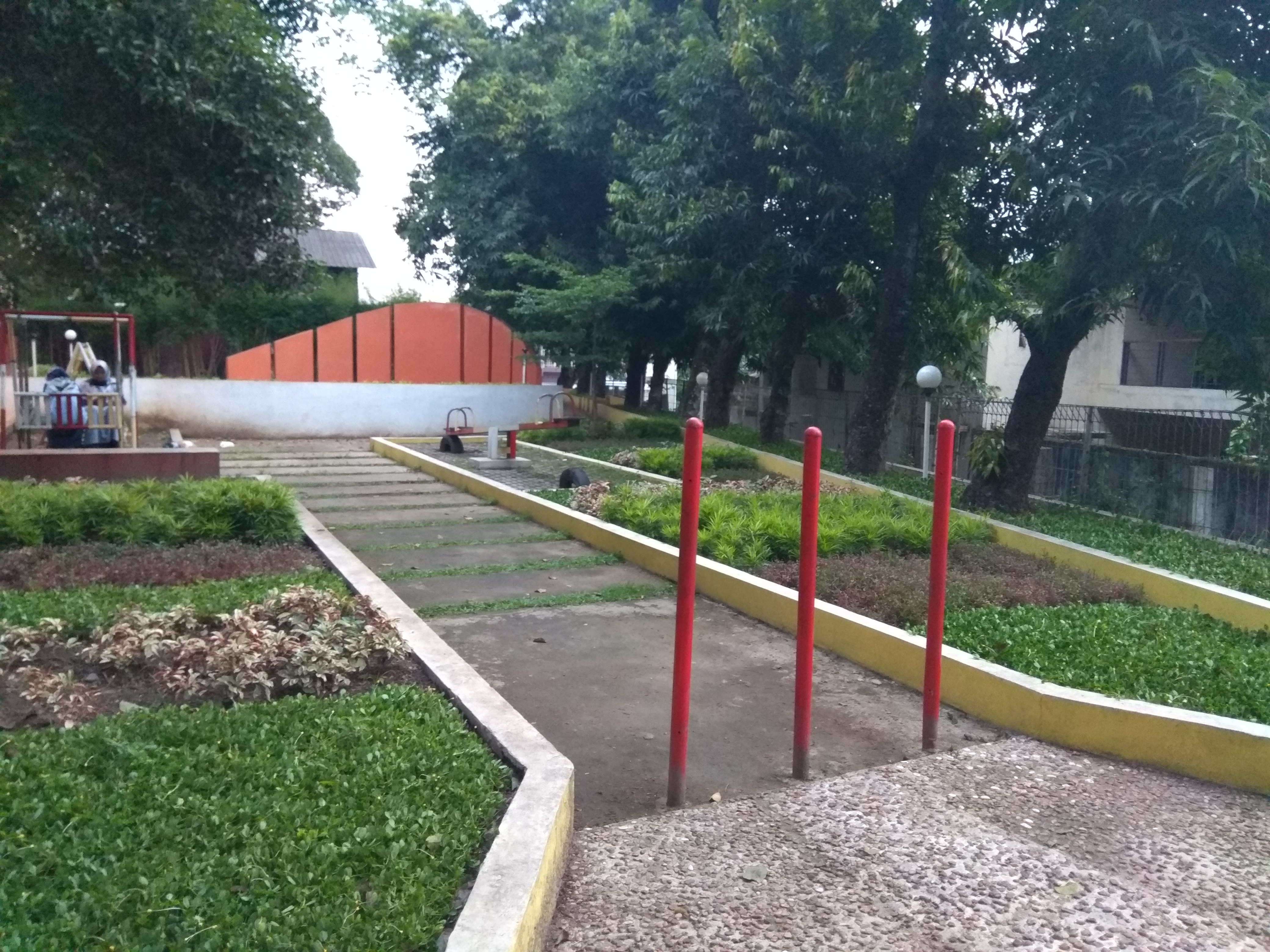 Arena Bermain Taman Karang